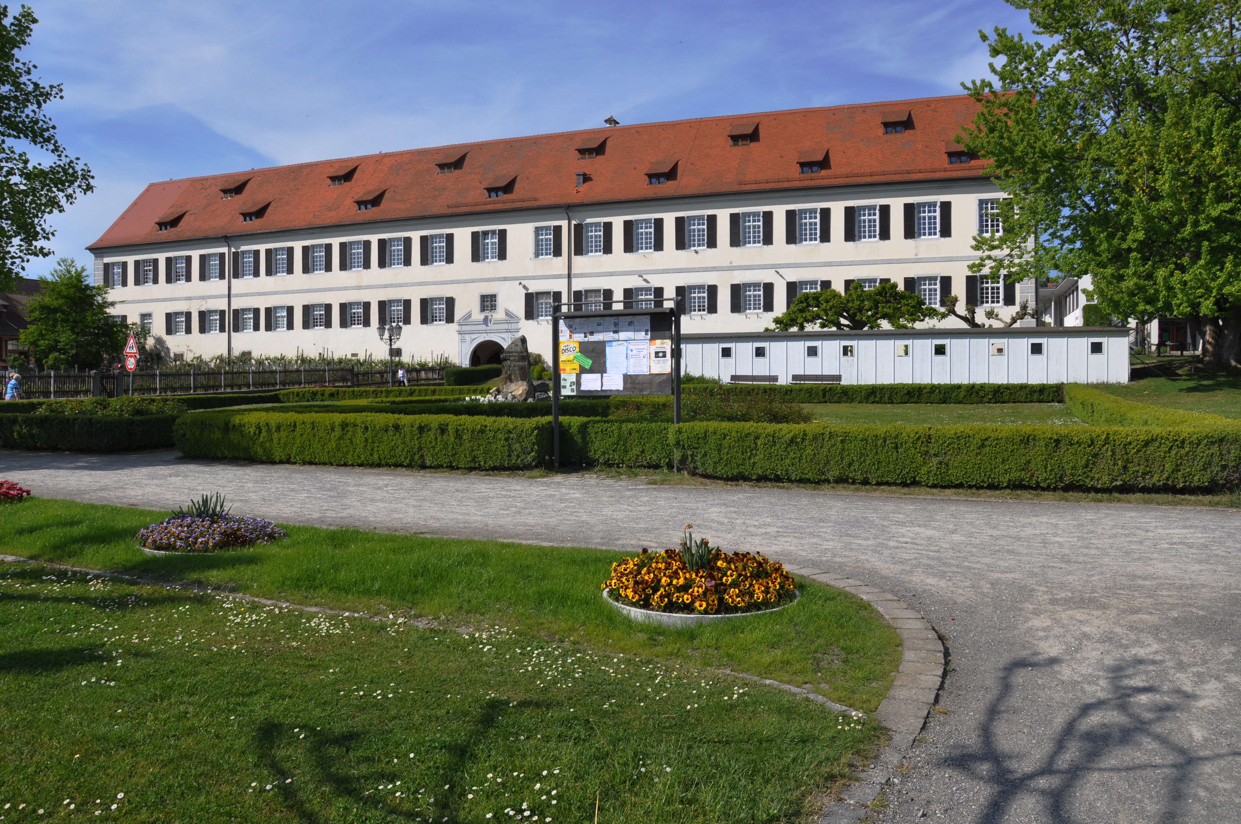 Hagnau am Bodensee, Rathaus, ehemalige Hofmeisterei des Klosters Weingarten